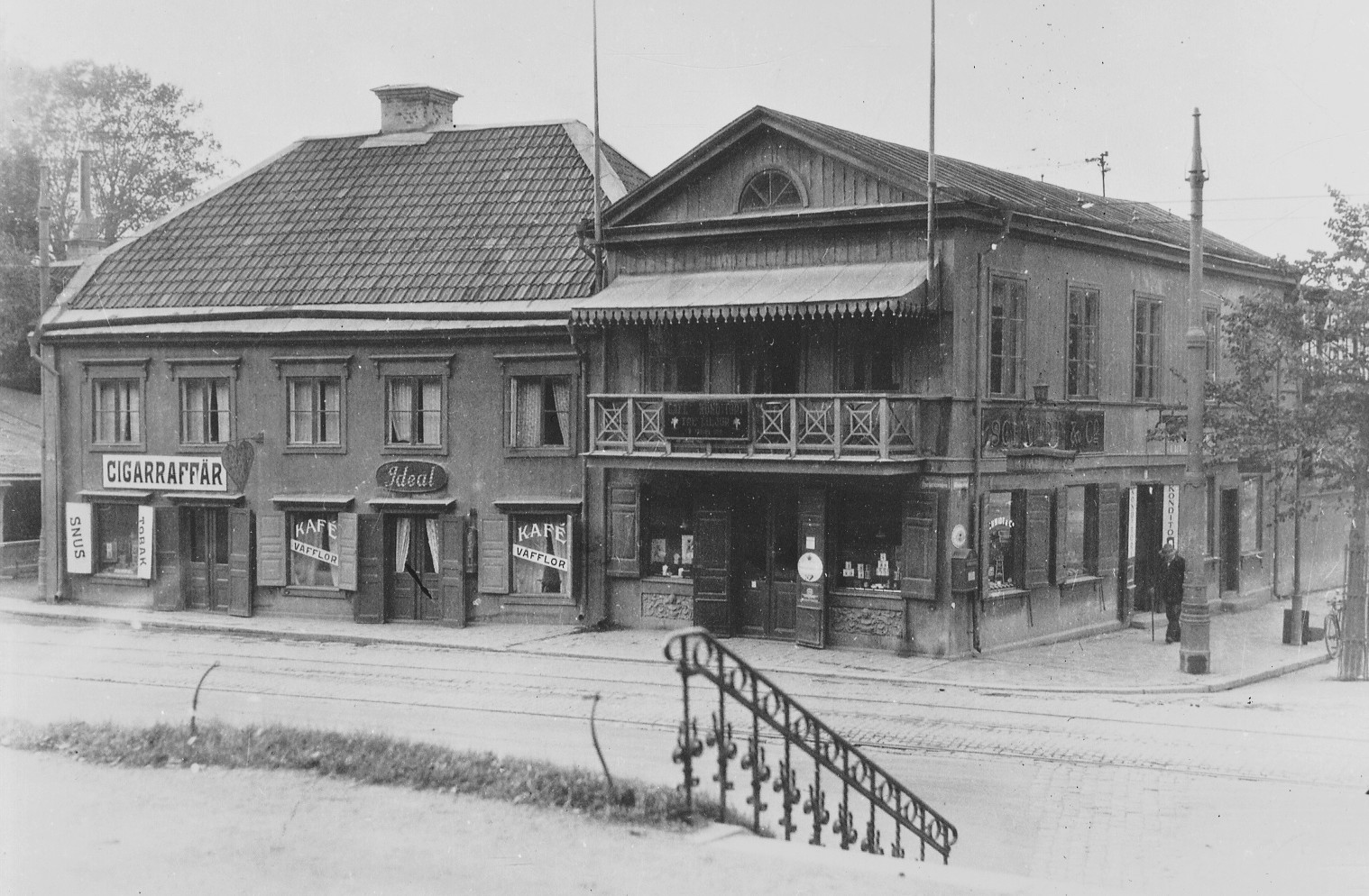 Kvarteret Masten 4, platsen där 1930 invigdes restaurangen Masten